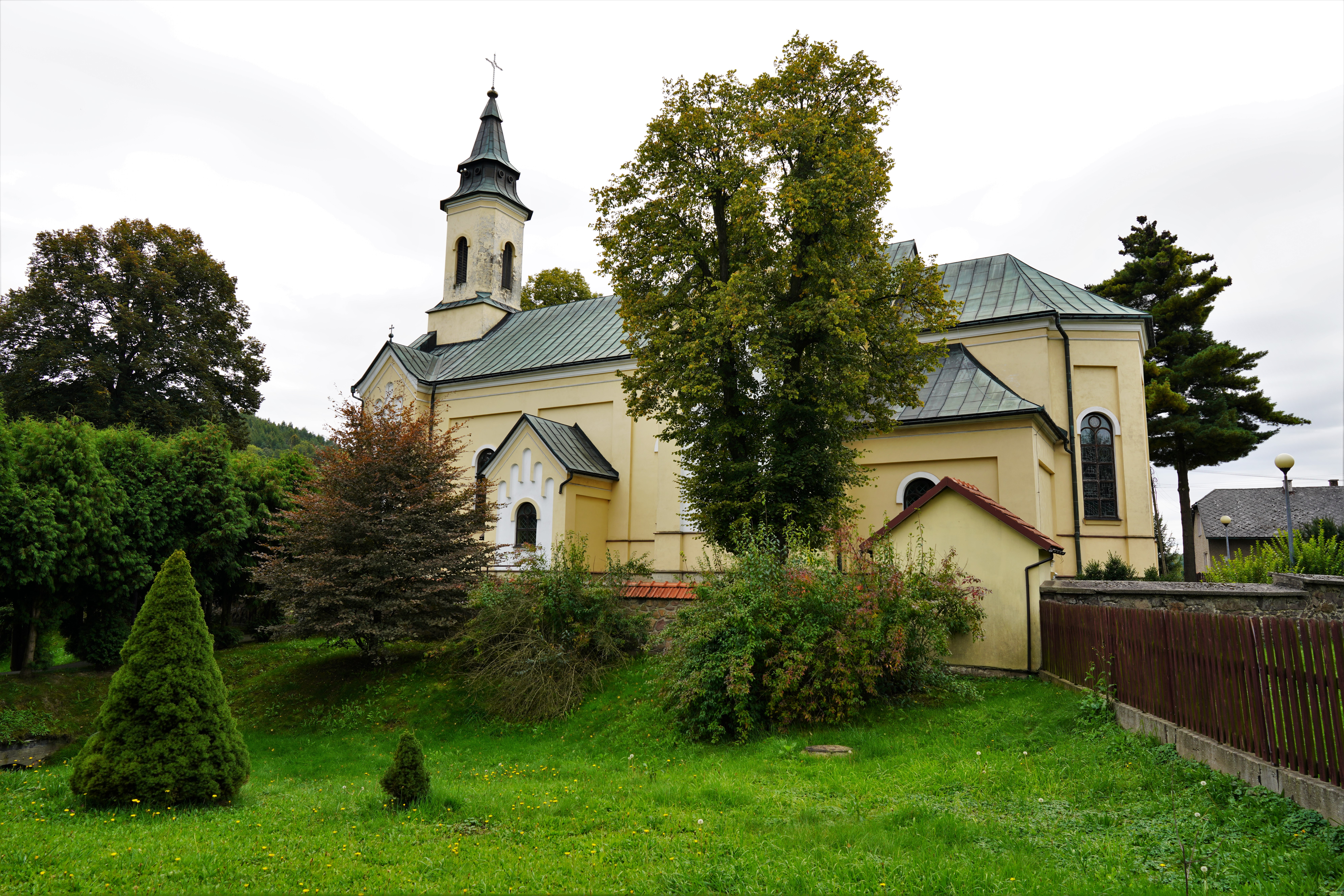 Regulice, Kościół parafialny św. Wawrzyńca